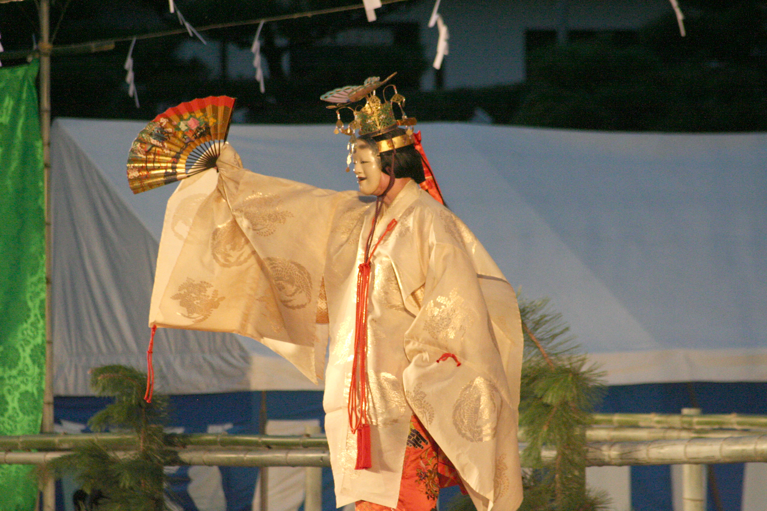 2009年7月31日に姫路城三の丸広場で行なわれた姫路薪能の様子。